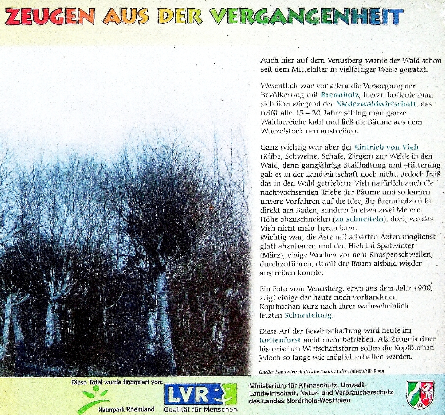 Infotafel "Kopfbuchen – Zeugen aus der Vergangenheit" in der Waldau, Dottendorfer Allee